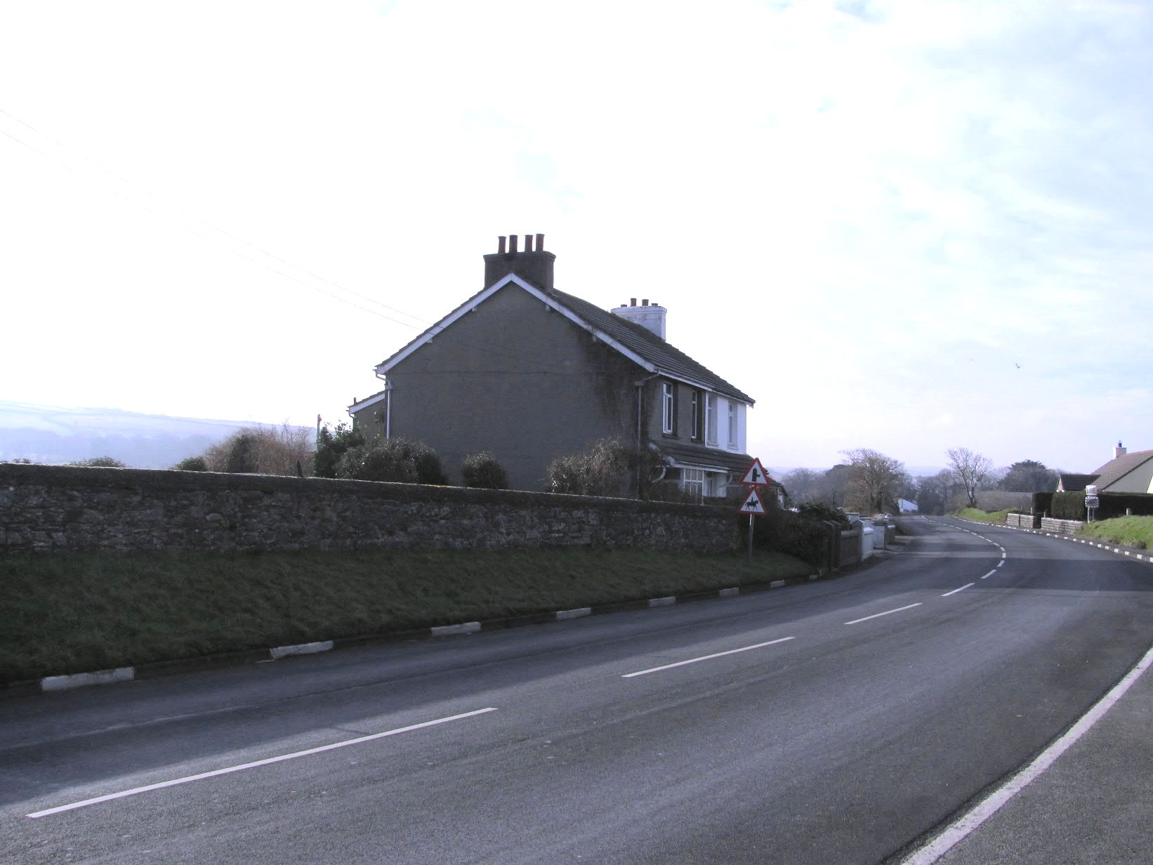 Birkins Bend